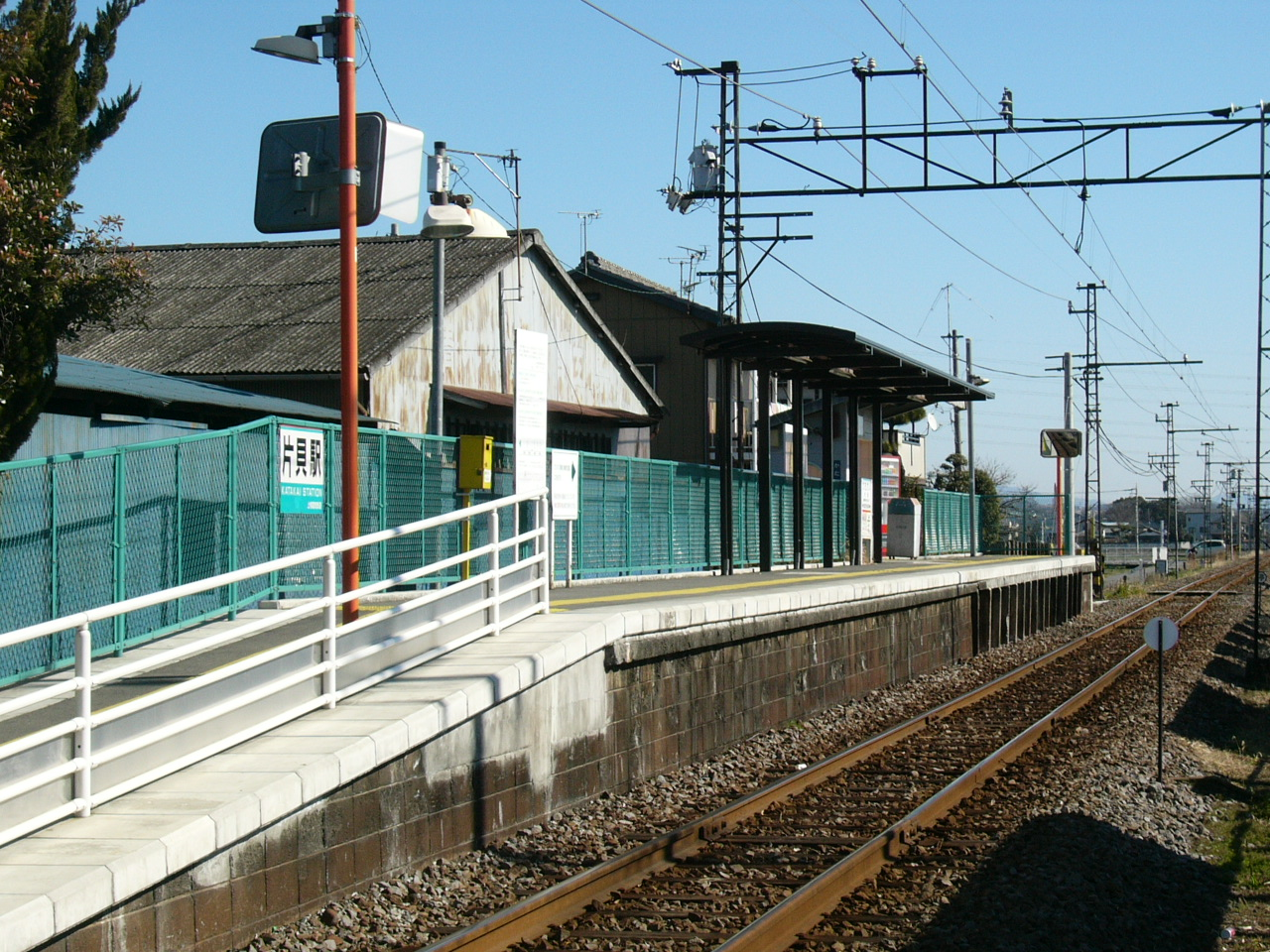 Katakai Station